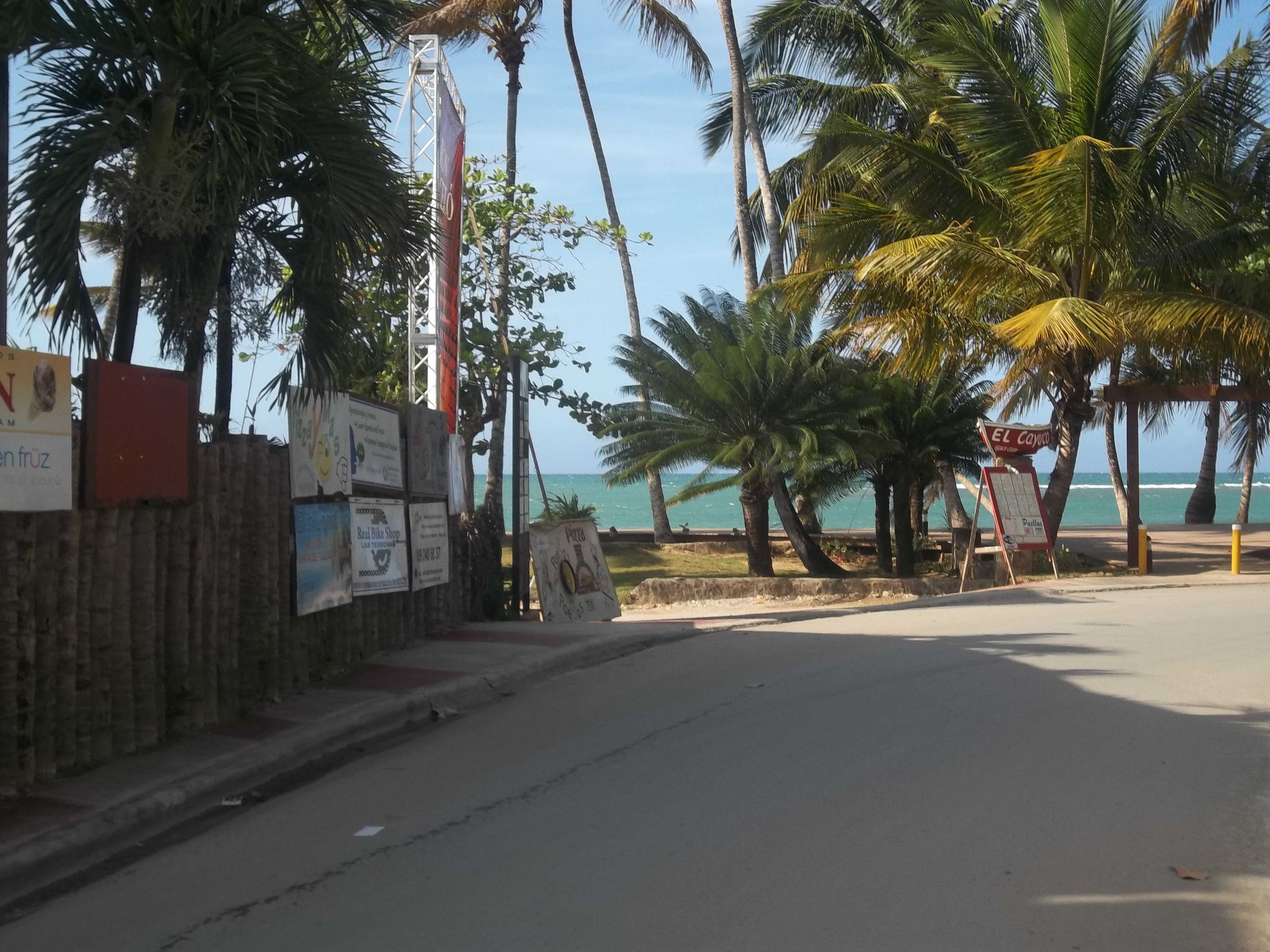 que linda calle